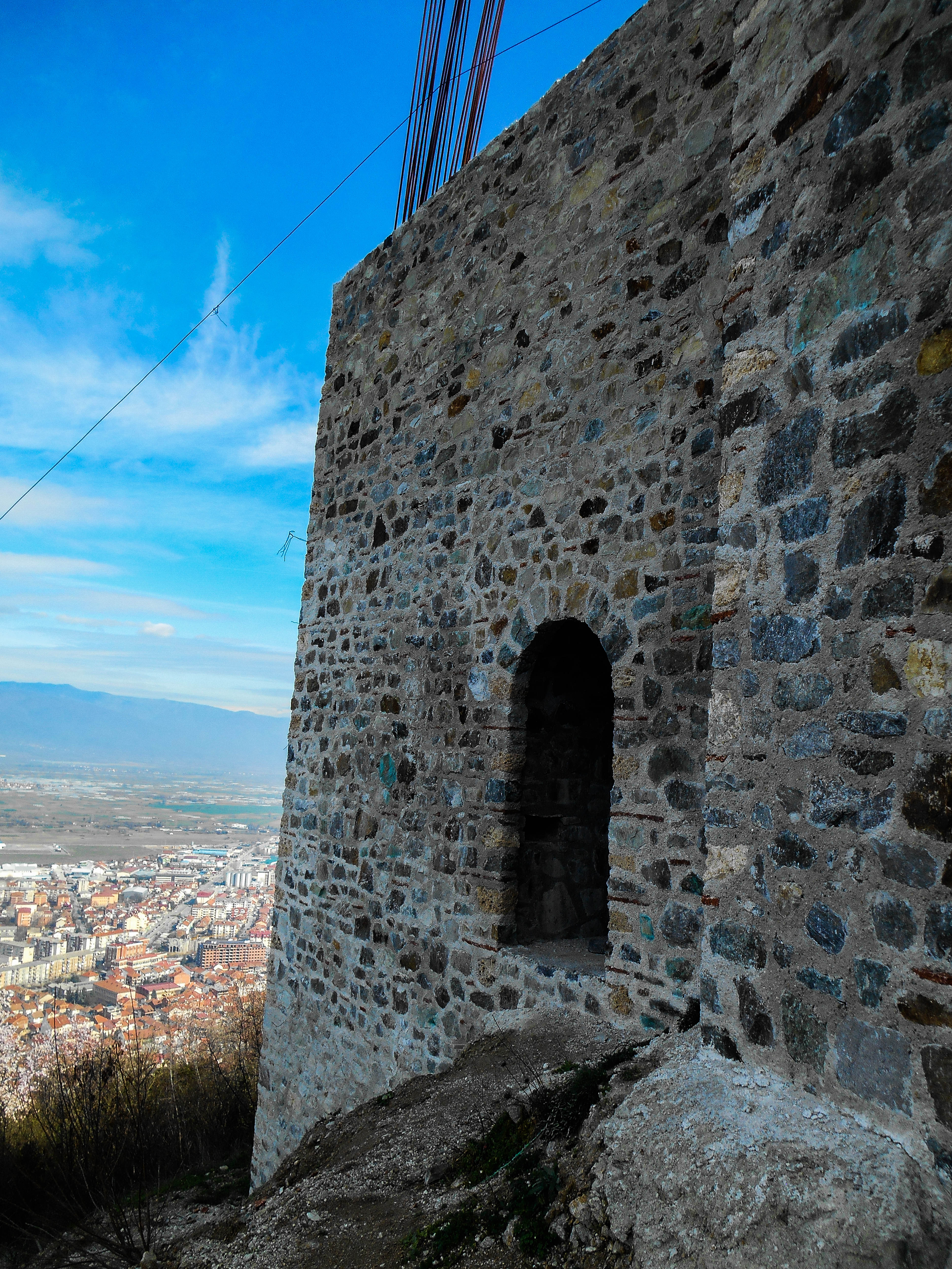 Цареви кули